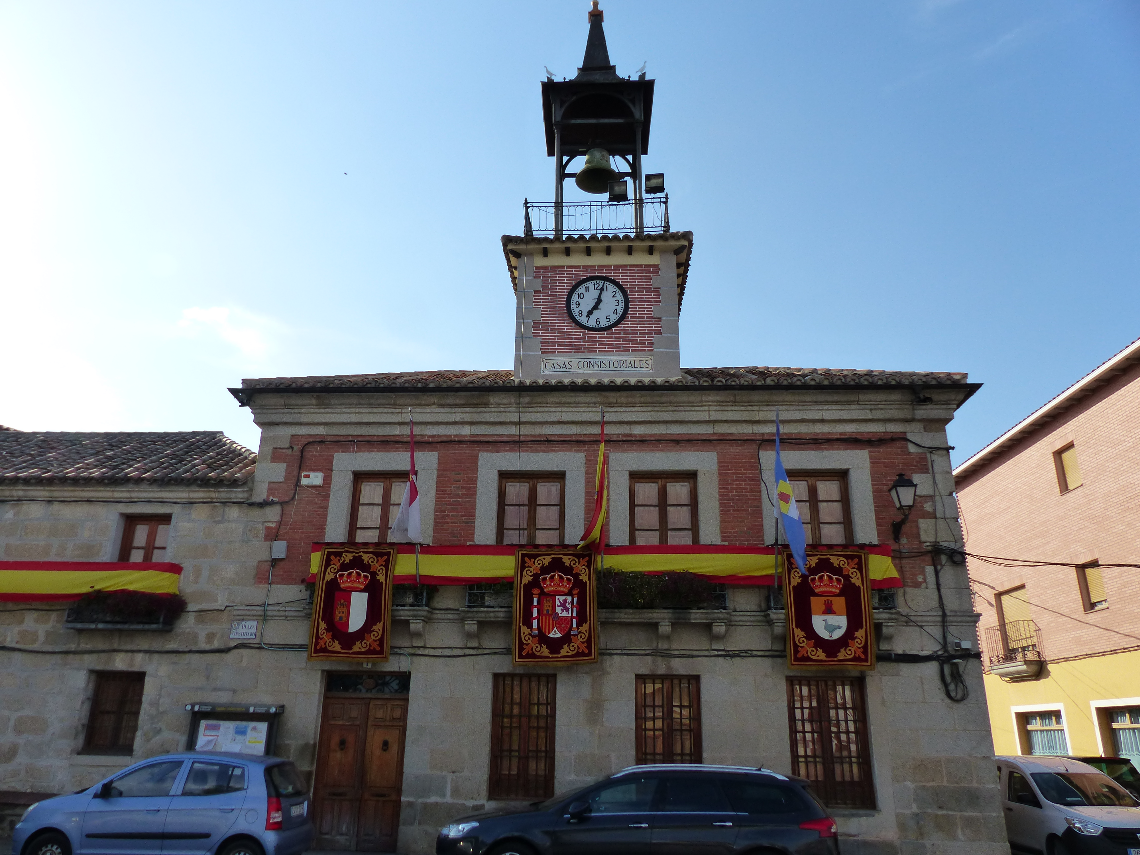 Ayuntamiento, Mejorada, Toledo, España